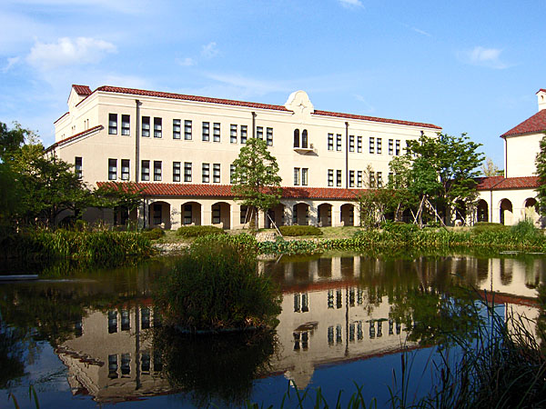 西宮上ヶ原キャンパス学院本部棟